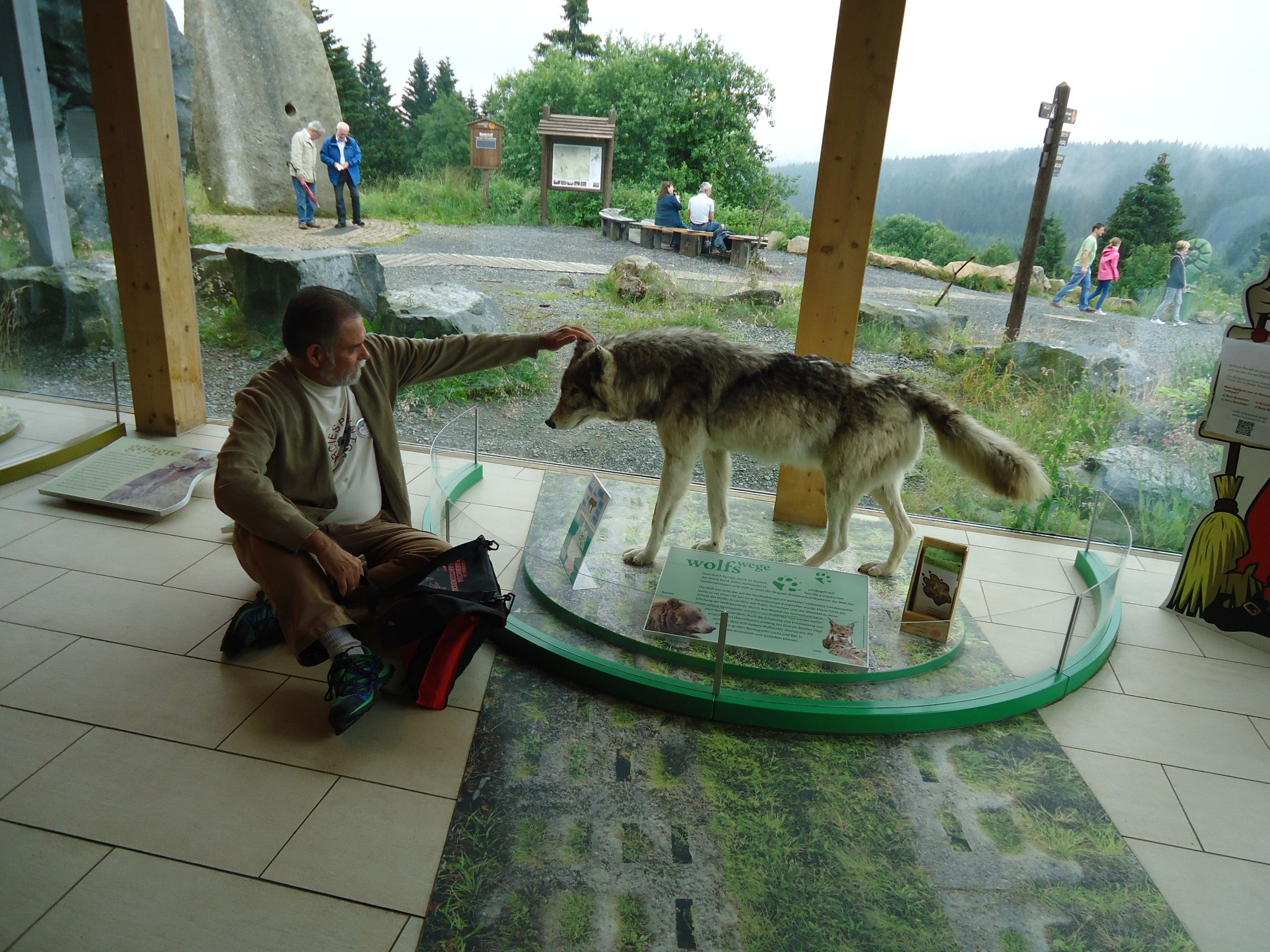 Remburita lupo por kompari kun virogrando